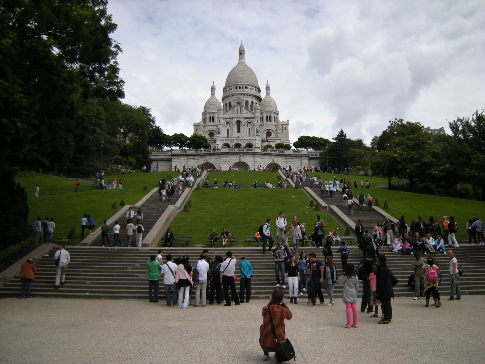 Square Louise-Michel (ex Square Willette) et façade sud de la Basilique du Sacré-Cœur de Montmartre, Paris, France.